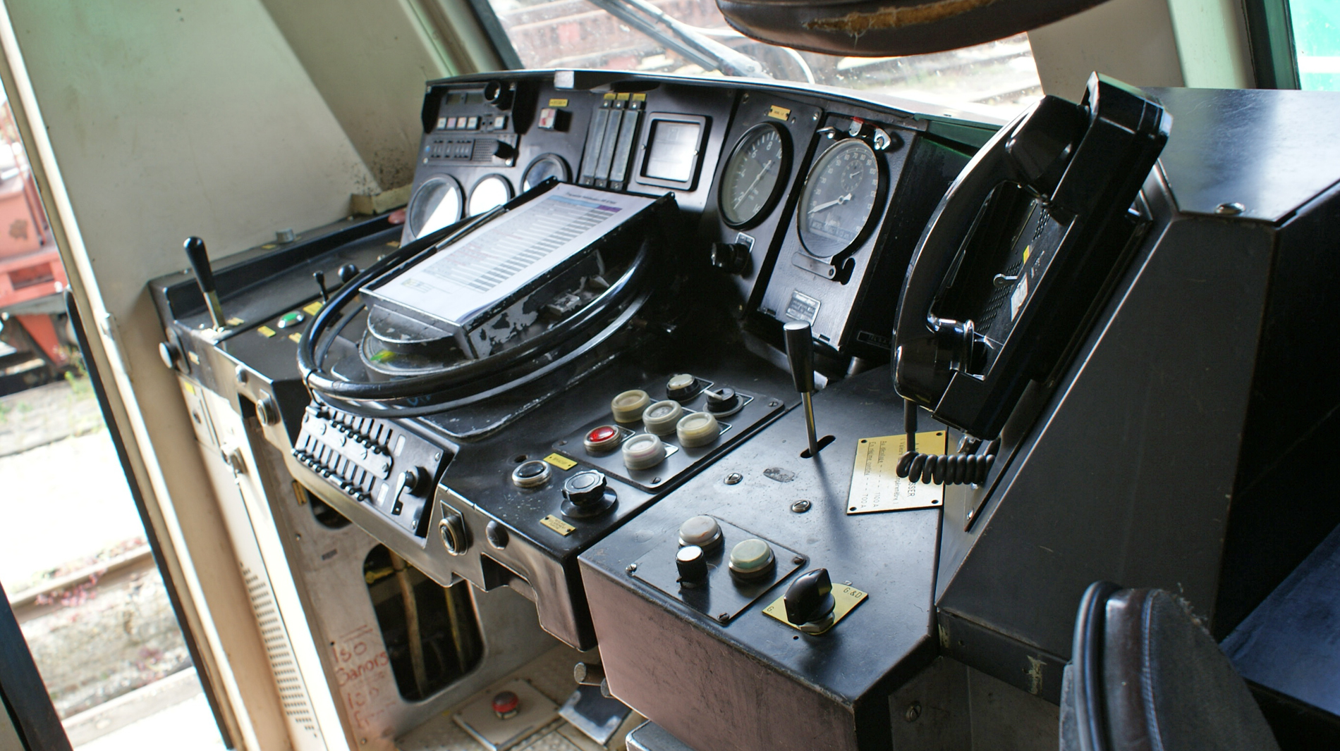 Pupitre commandes BB 67600